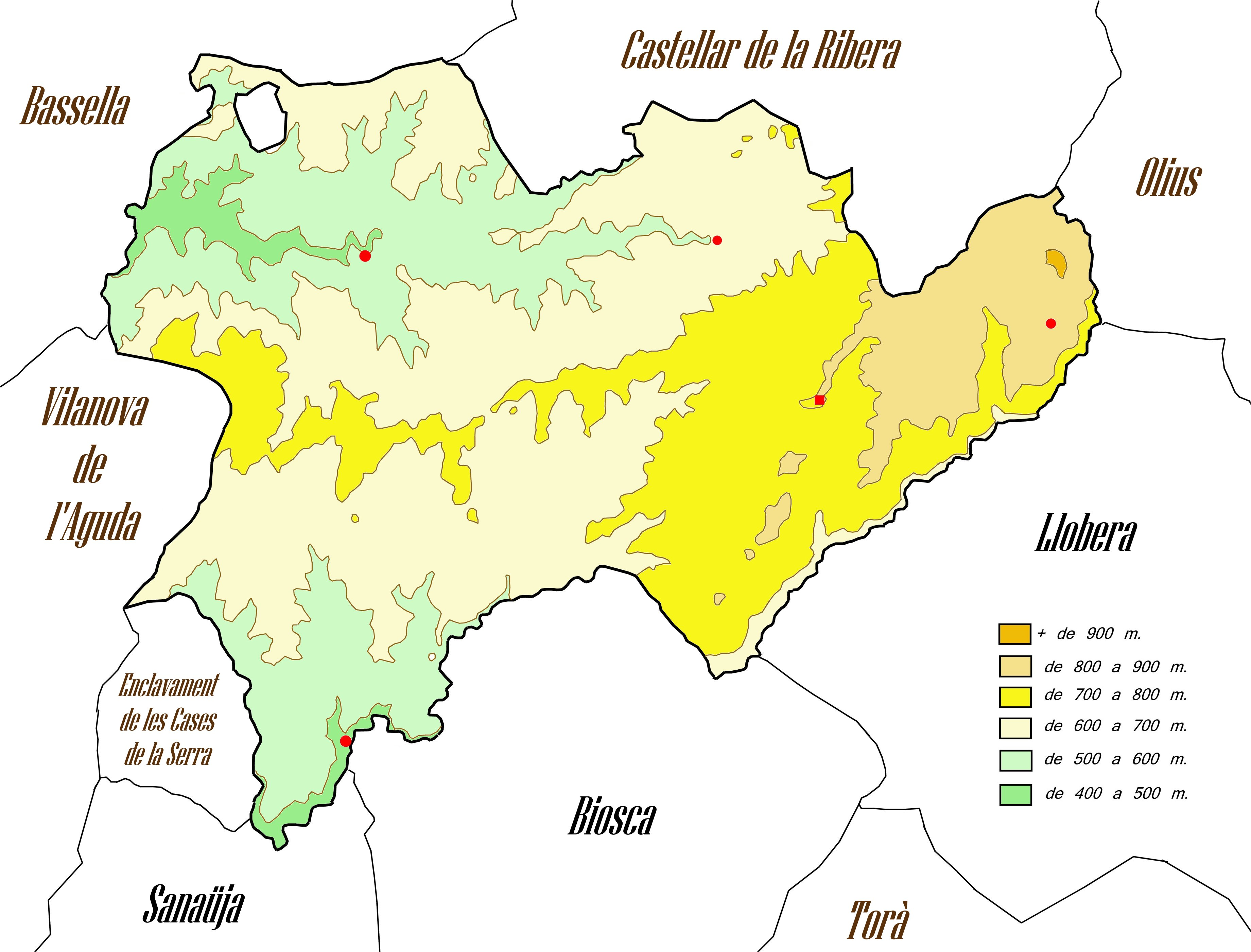 Mapa orogràfic del municipide Pinell de Solsonès.